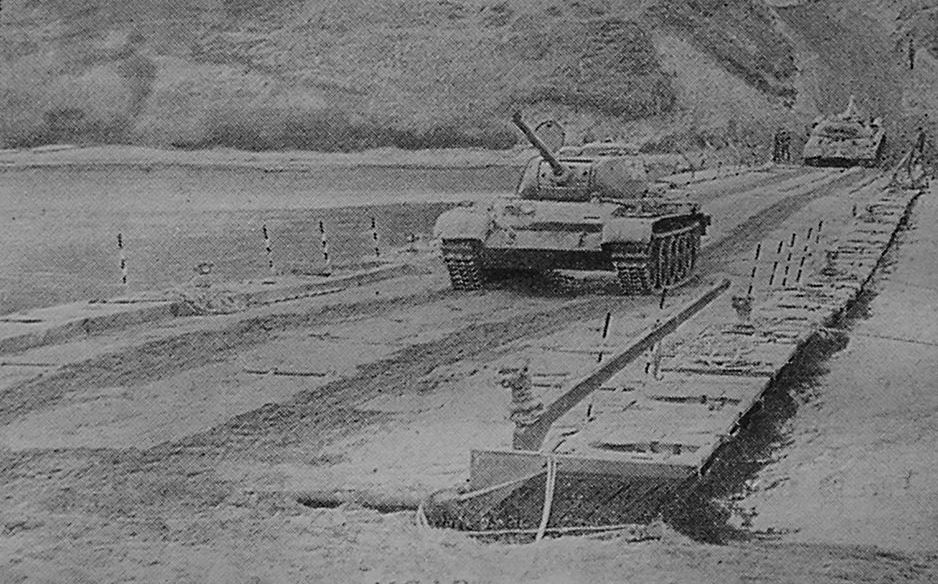 НАРМ